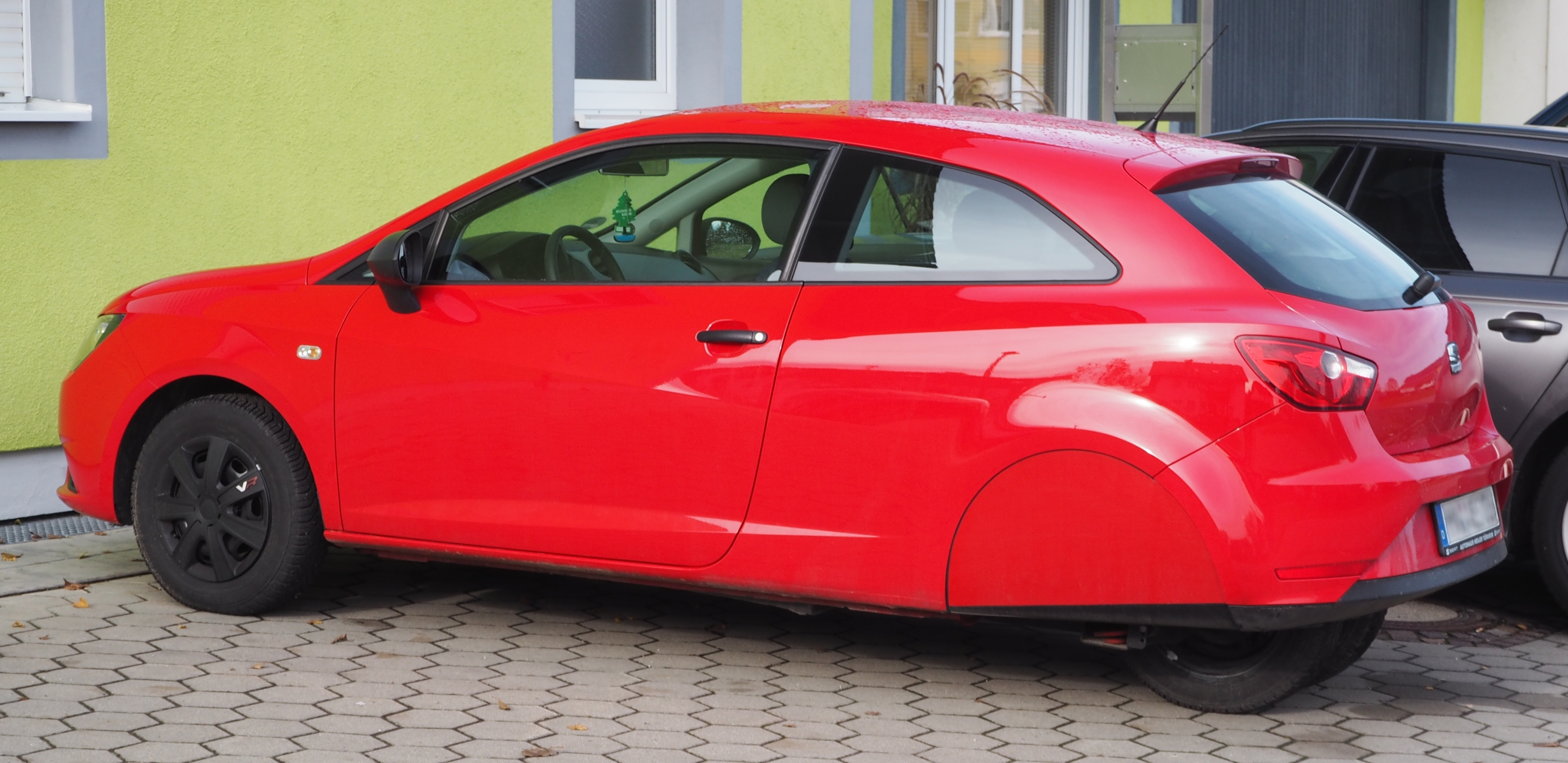 3rädriges Fahrzeug auf Basis eines Seat von Ellenrieder, darf als dreirädriges Fahrzeug der Klasse L5e ab 16 Jahren mit Führerscheinklasse A1 gefahren werden.